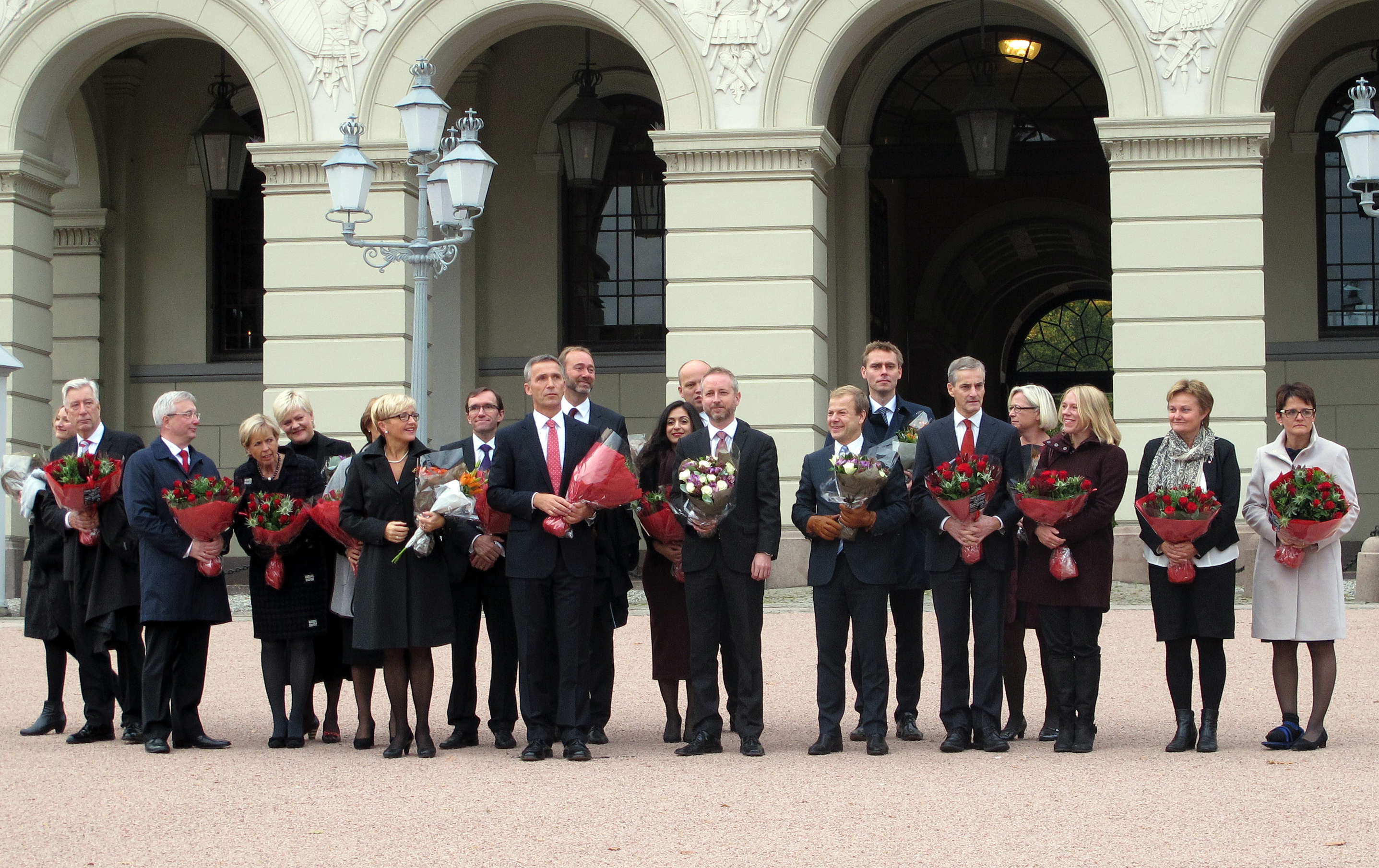 Stoltenberg's Second Cabinet